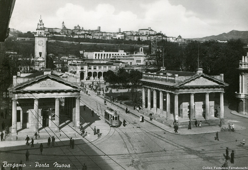 Cartolina illustrata di Porta Nuova a Bergamo. È in transito una vettura tranviaria.